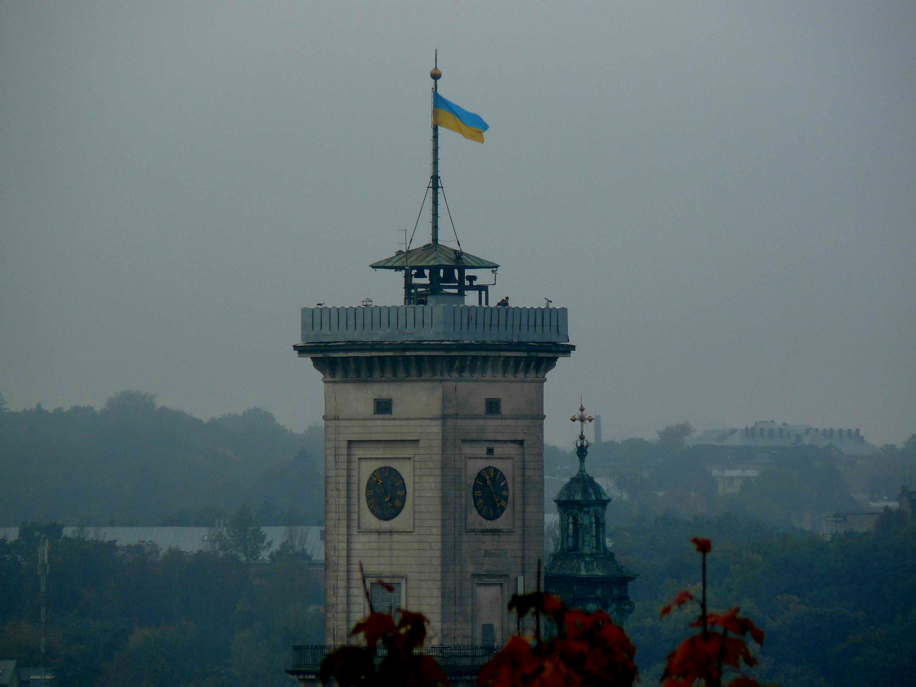 ратуша, Львів, Ринок пл., 1